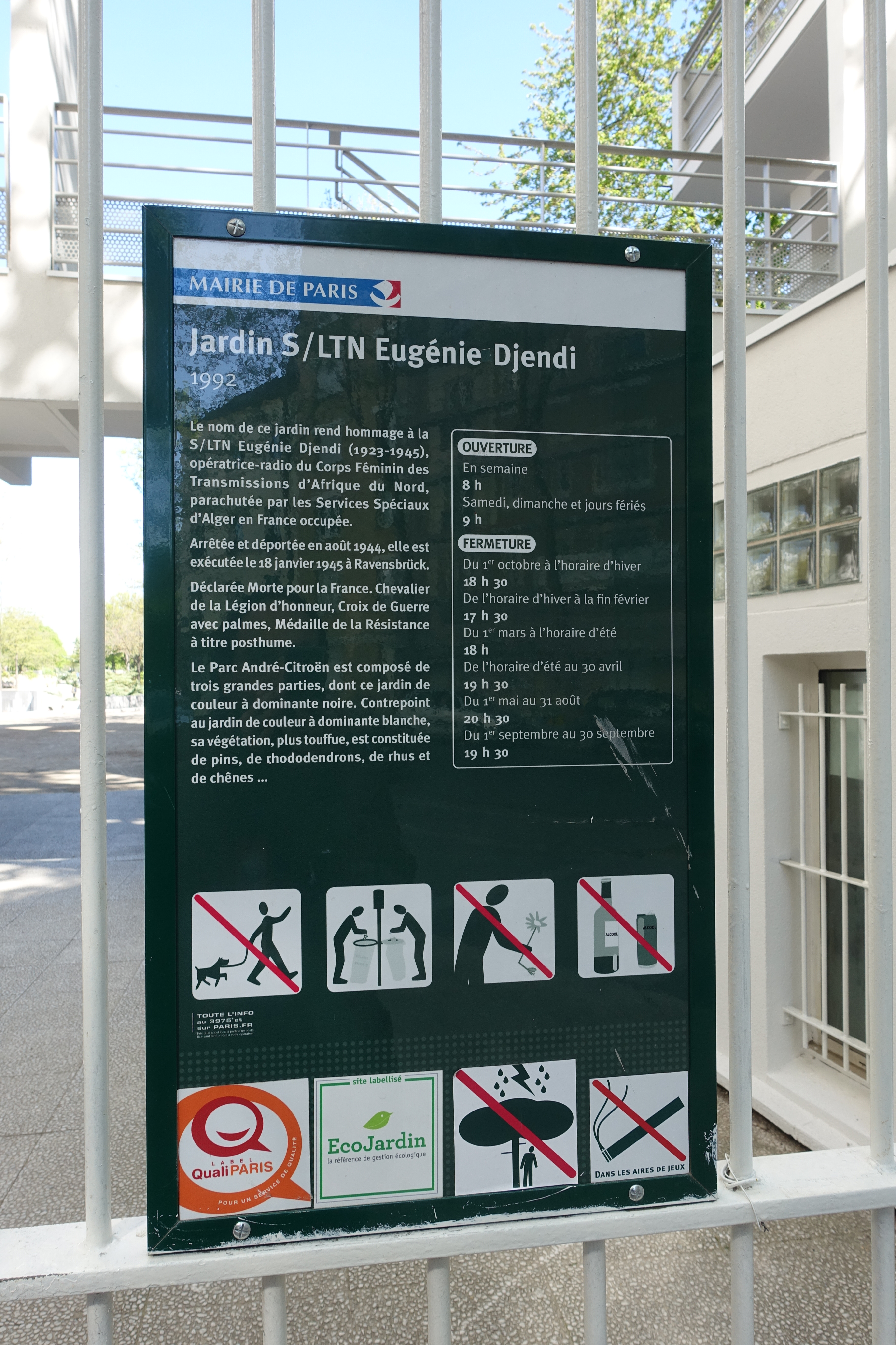 Jardin S/LTN Eugénie Djendi @ Paris Jardin Eugénie-Djendi, Parc André-Citroën, 2 Rue Cauchy, 75015 Paris, France.